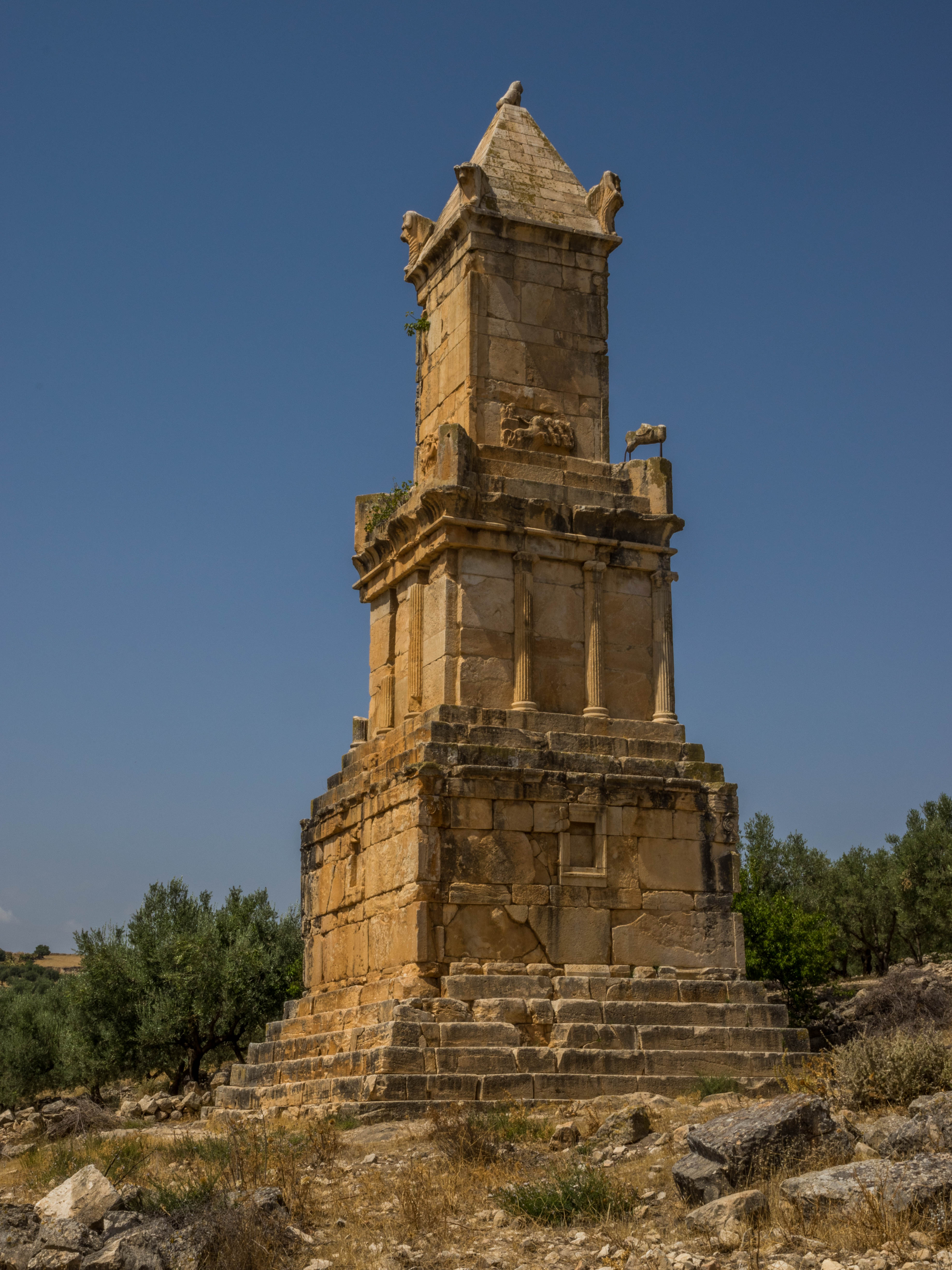 Grand mausolée